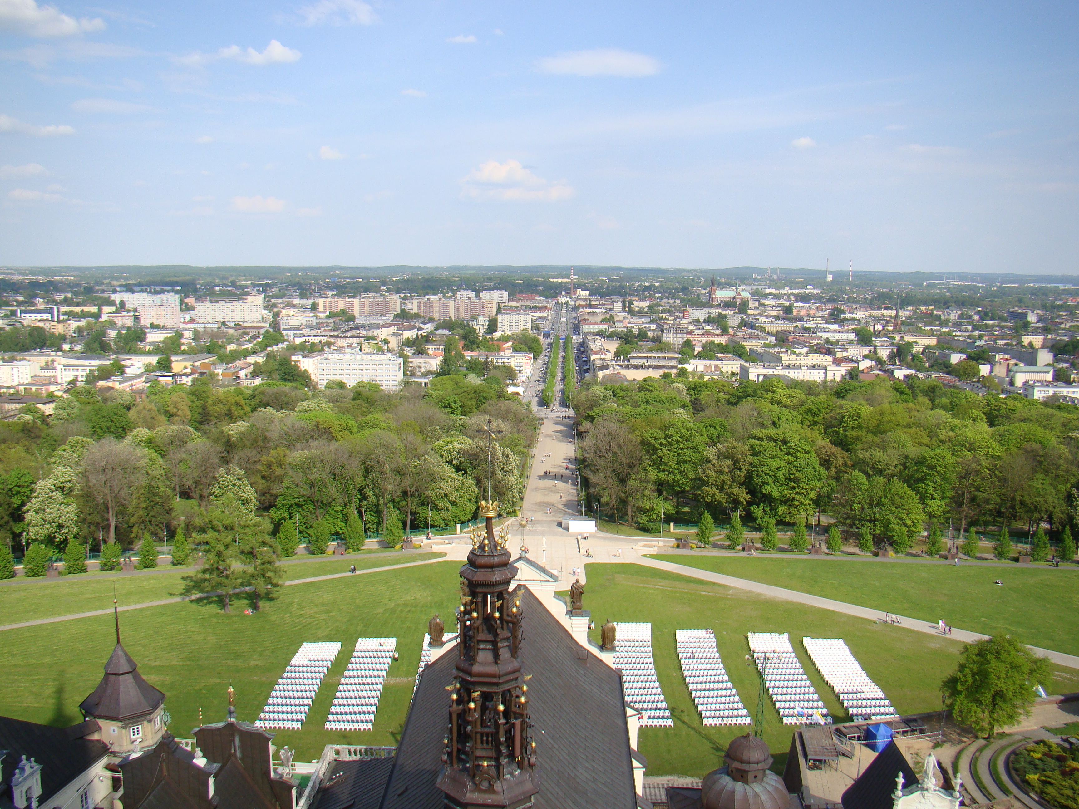 Częstochowa, kościół pw. Wniebowzięcia NMP i Znalezienia Krzyża Św., 1425-1463, 1690-1696